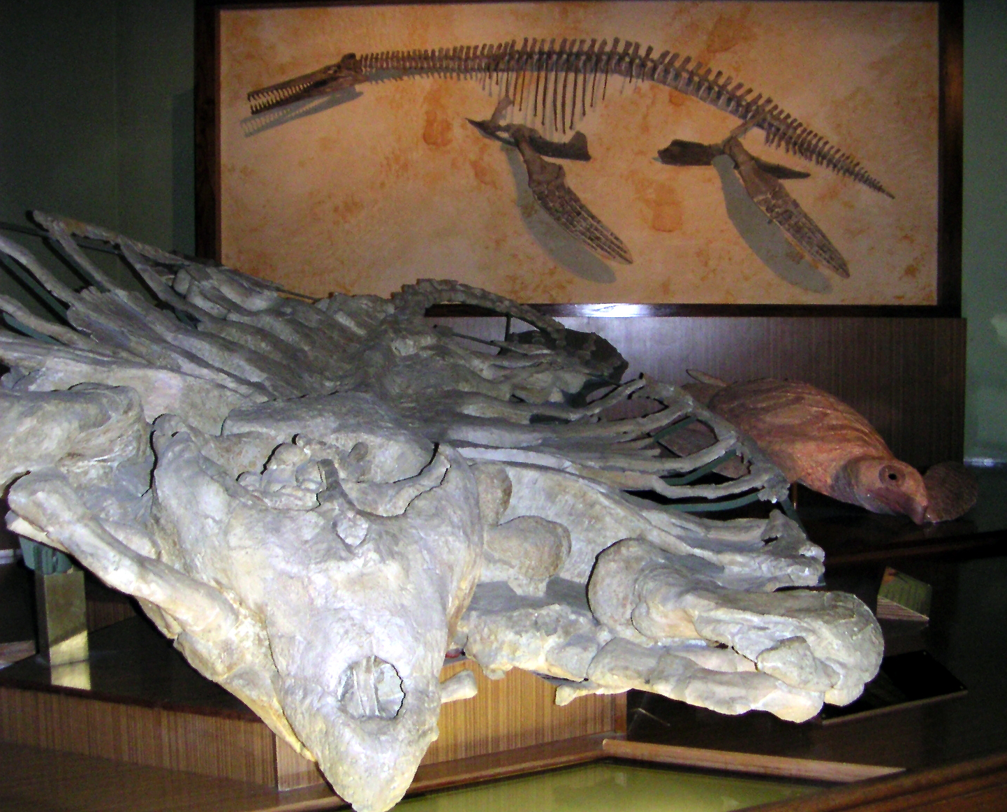 Exponate des Naturhistorischen Museums in Wien. selbst fotografiert